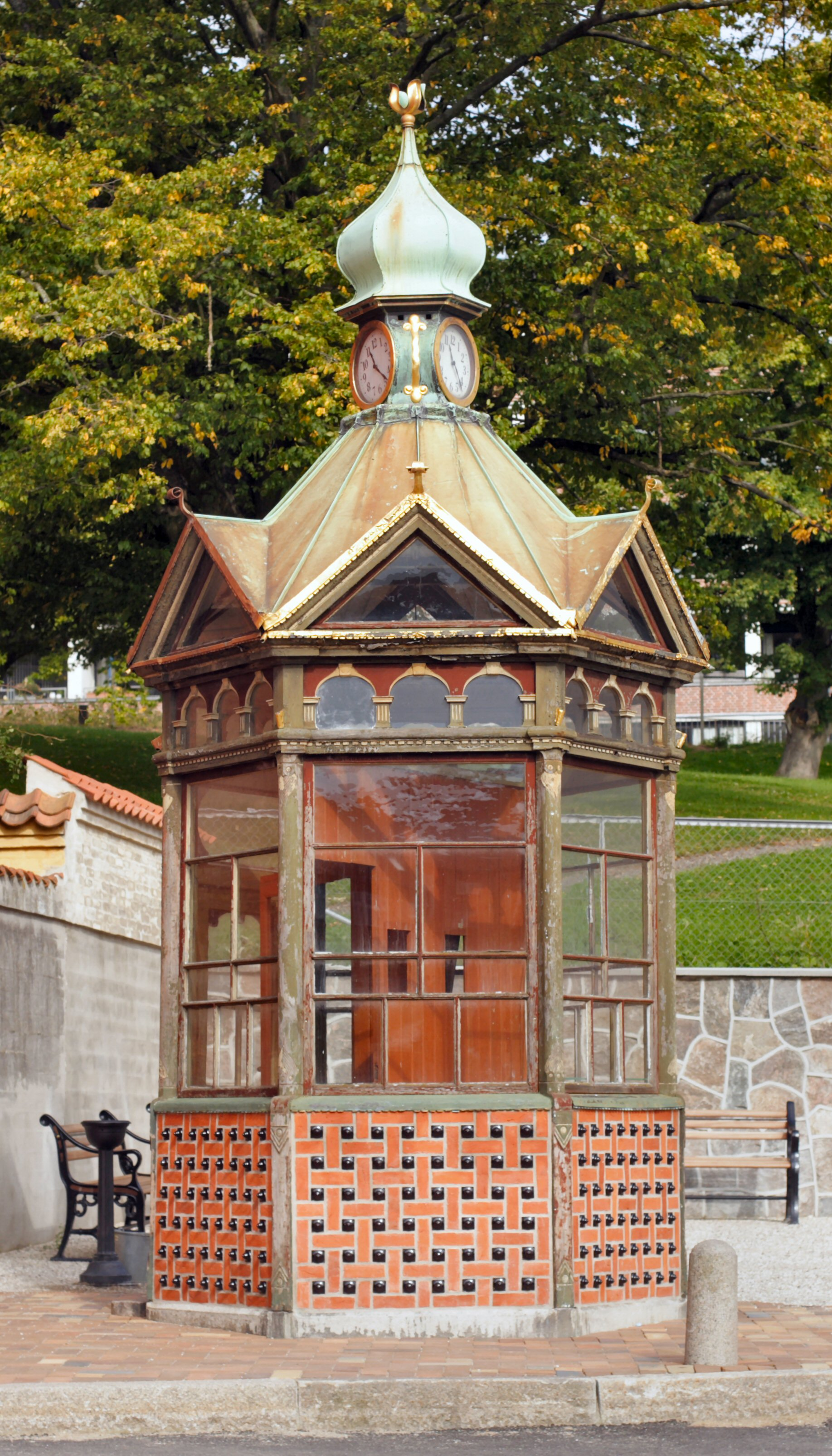 Telefonkiosk i Den gamle by i Aarhus designet 1900 af Thorkel Møller